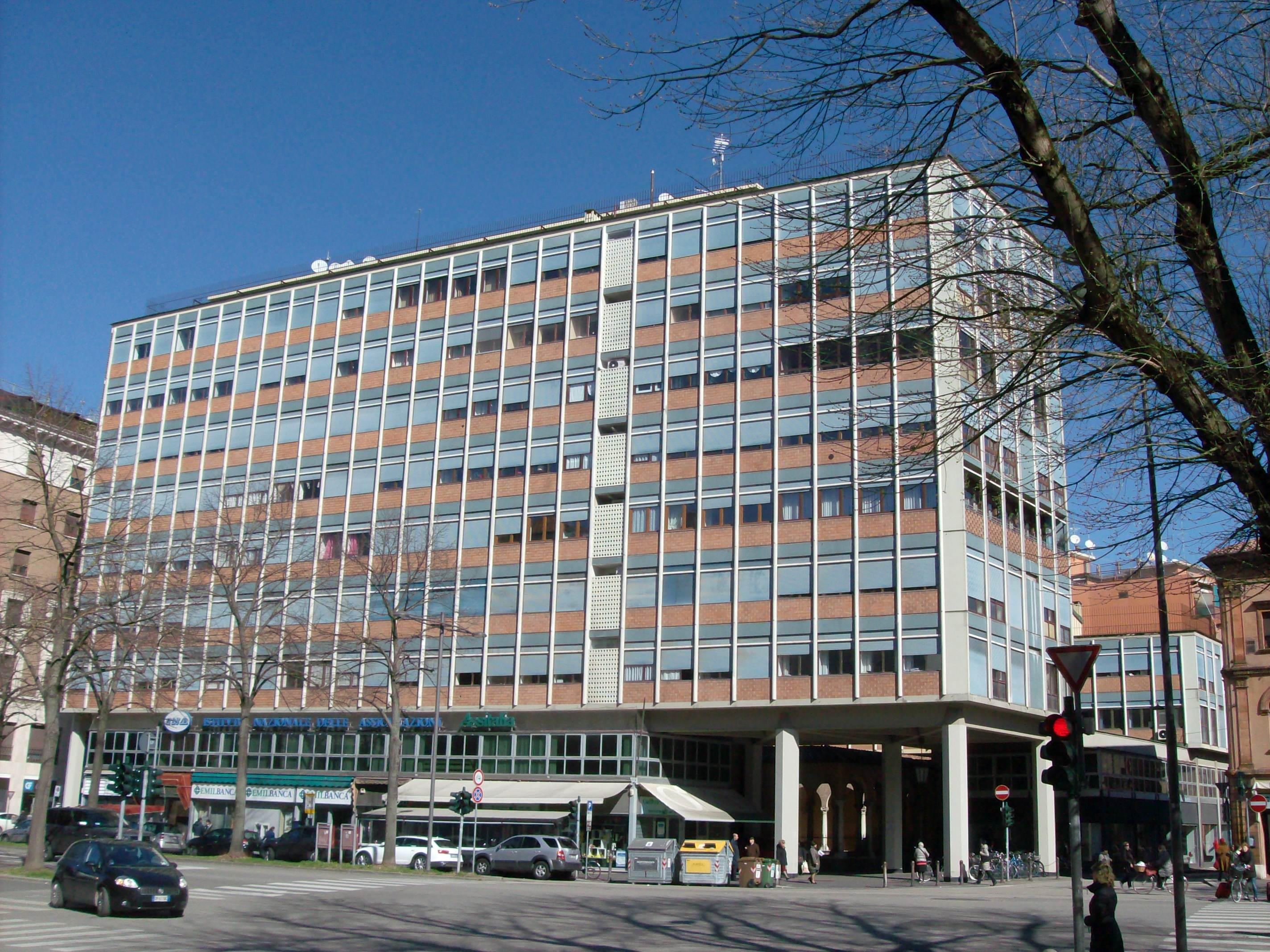 Palazzo INA in viale Cavour Ferrara